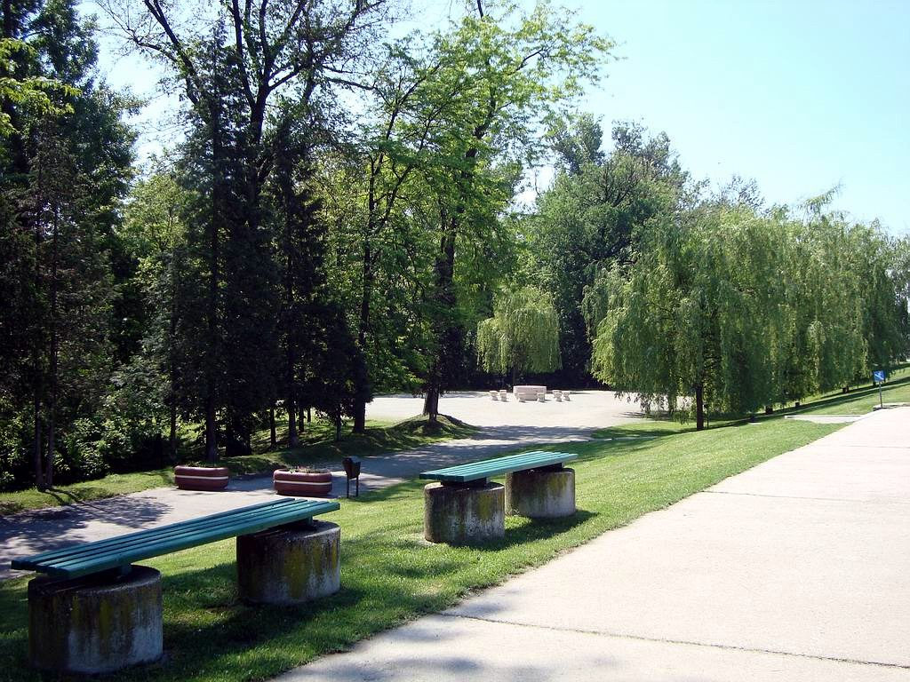 Masa tăcerii cu 12 scaune rotunde din municipiul Târgu Jiu, Bd. Brâncuşi Constantin, Grădina Publică, construită în anii 1937-1938 03